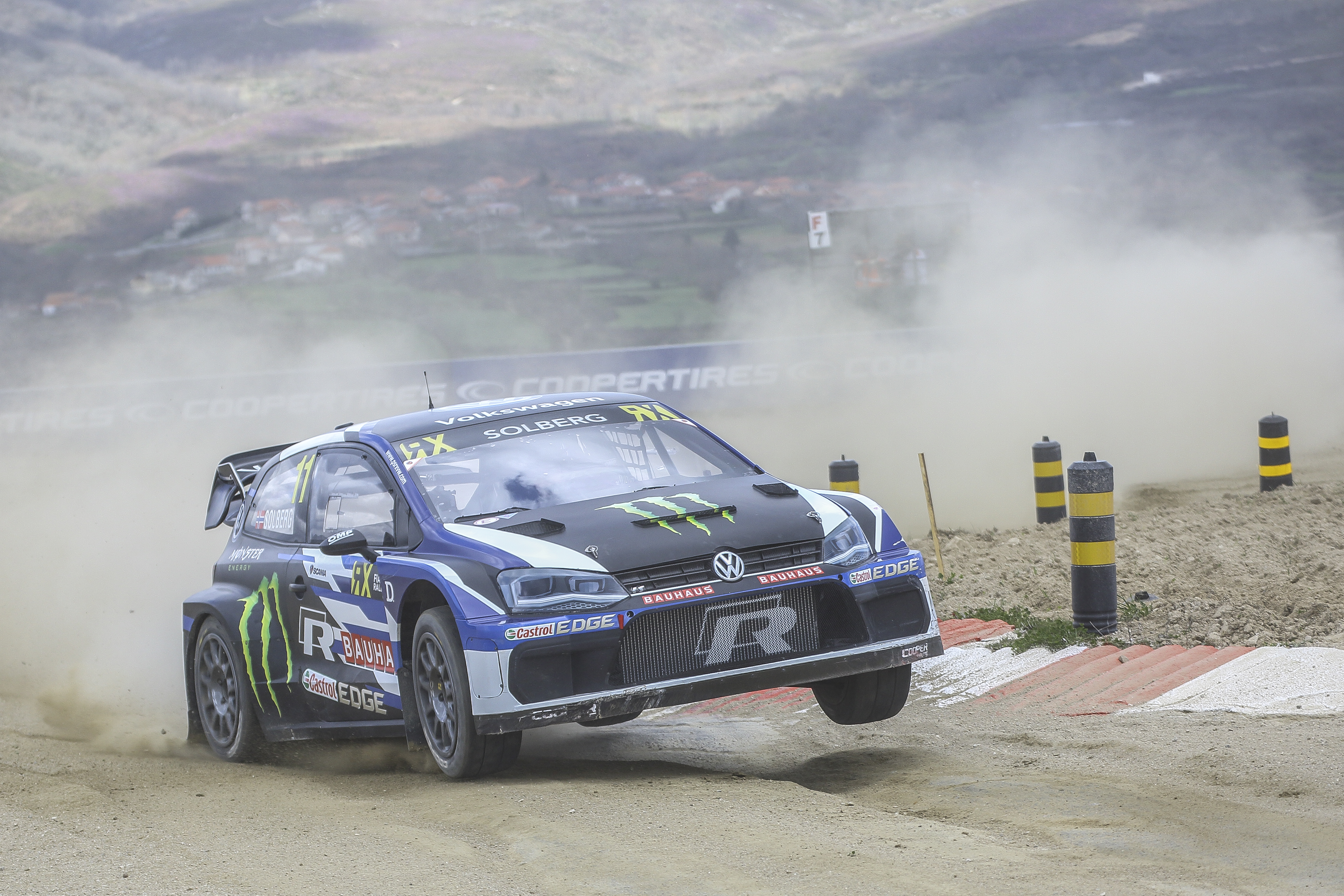 Johan Kristofferssonganó en la final en Portugal, tras hacerlo en España, el Sueco se afianza en el liderato provisional del Campeonato. Sin embargo no fue el mejor en las mangas de entrenamiento que fueron dominadas por Andreas Bakkerud.